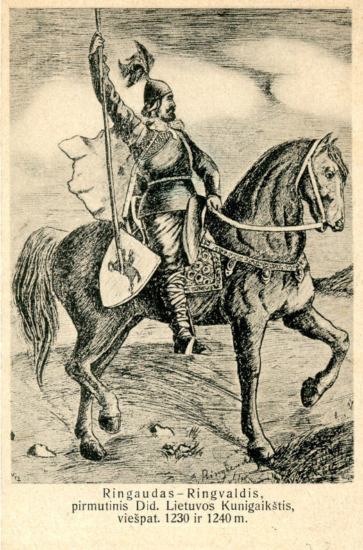 Lietuvos Didysis kunigaikštis Ringaudas. Išleista Šv. Kazimiero draugijos leidyklos, 1920 m.